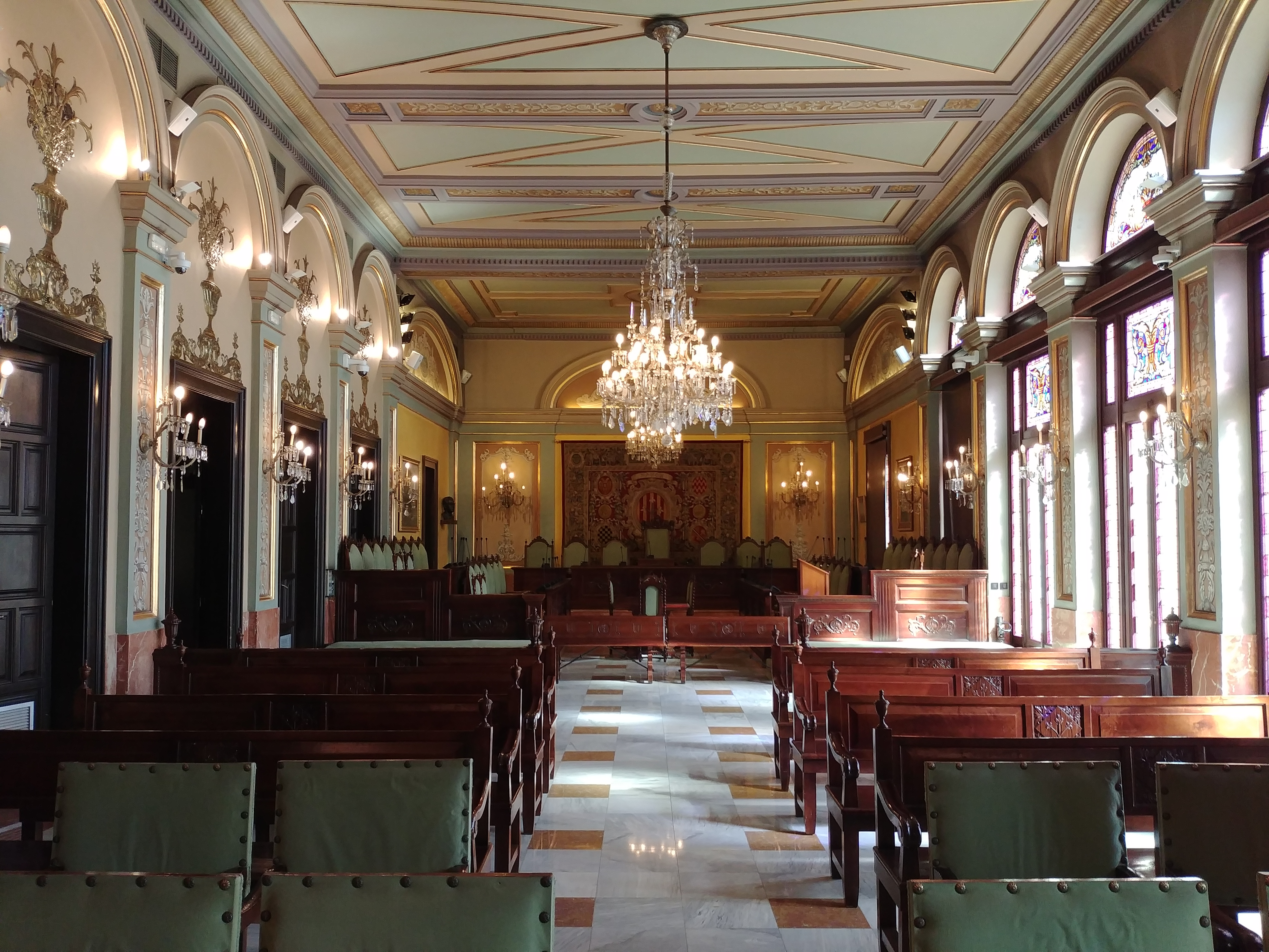 Espai encarat al retaule, a mà esquerra a l'entrar a la sala de plens.